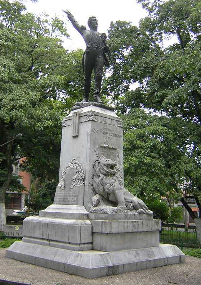 Estatua de Jose Maria Cordoba, ubicado en Parque de Boston, Medellín, Colombia